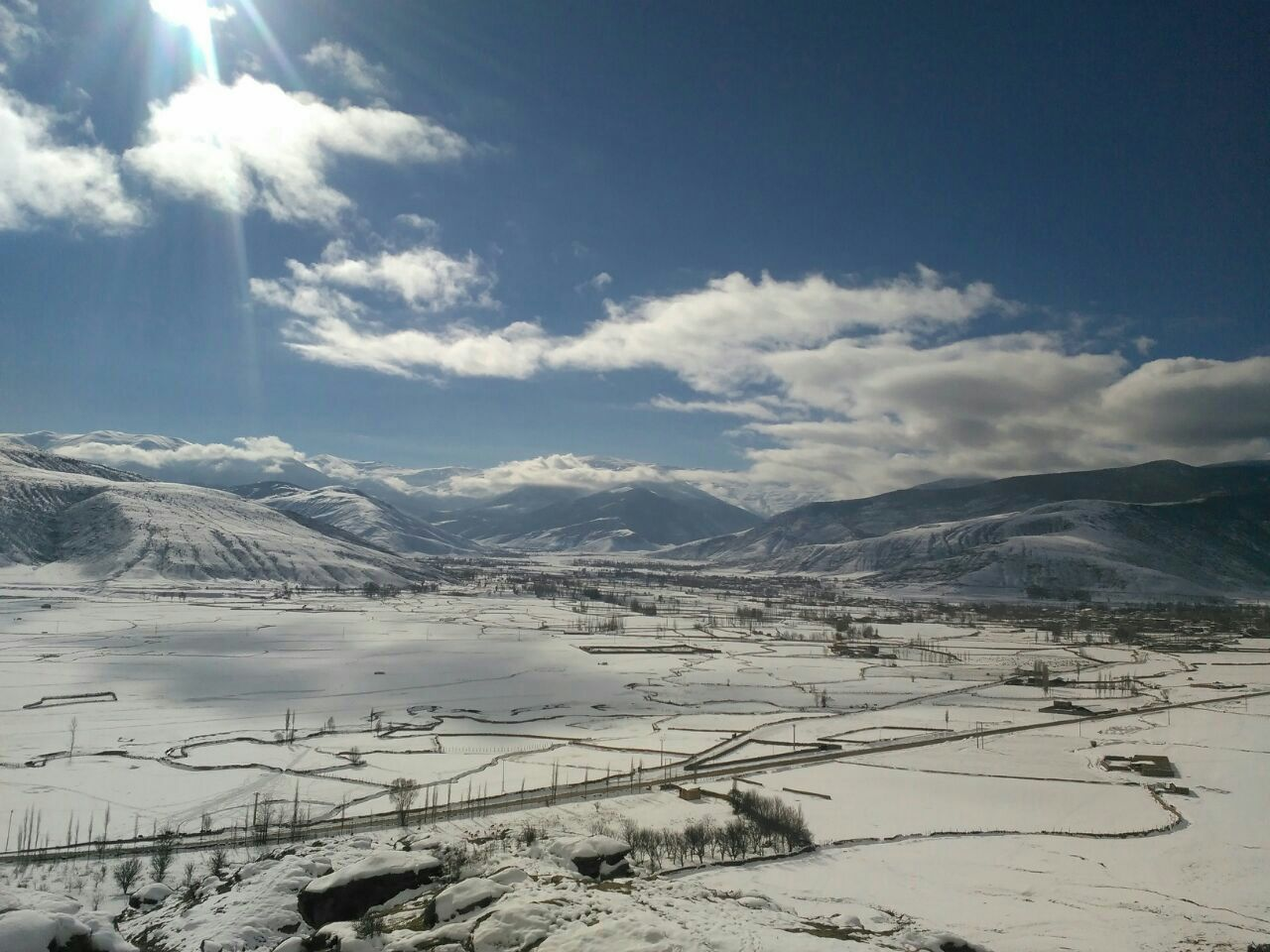 دورنمای شهر کجور